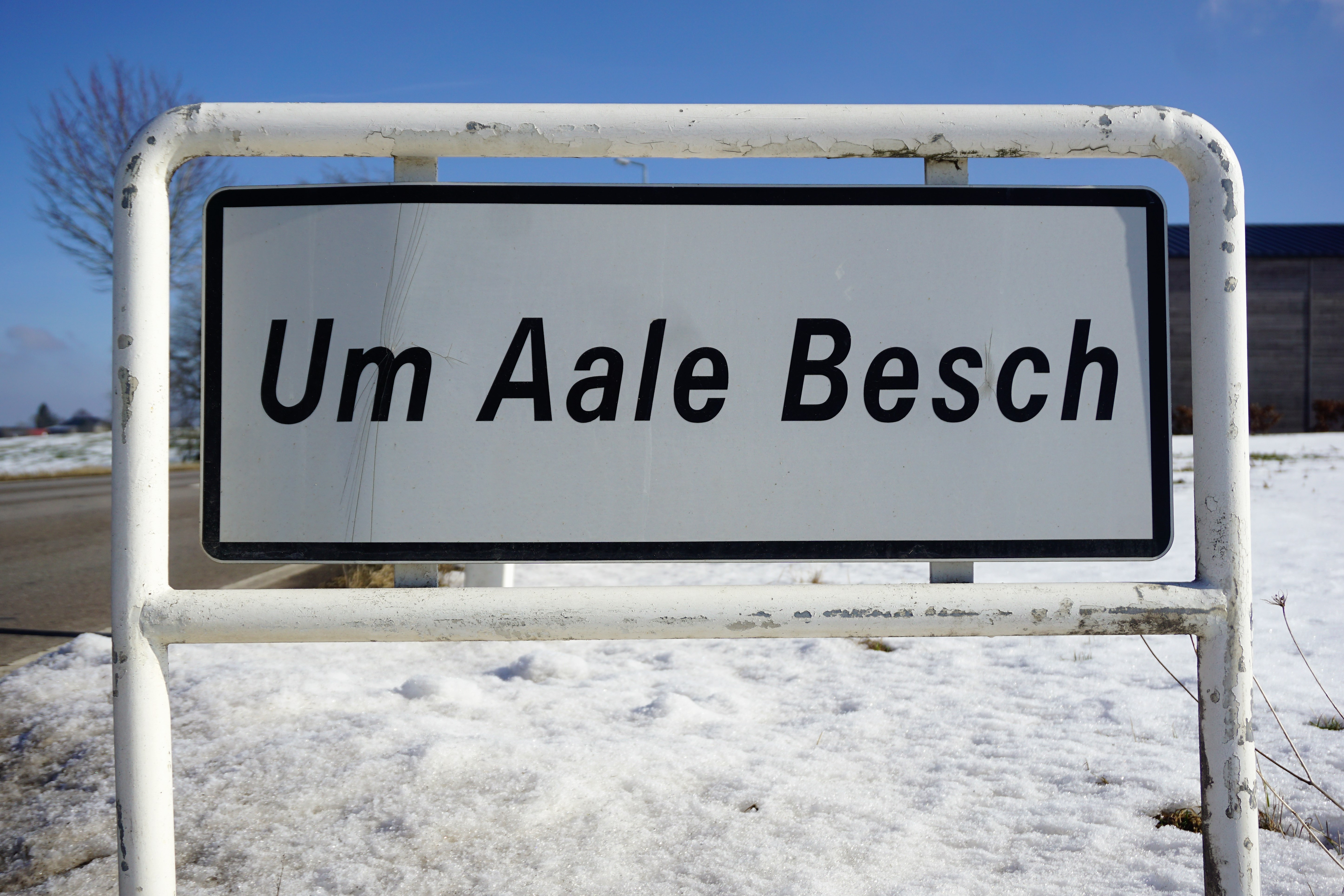 Esch-sur-Sûre, lieu-dit Um ale Bësch.